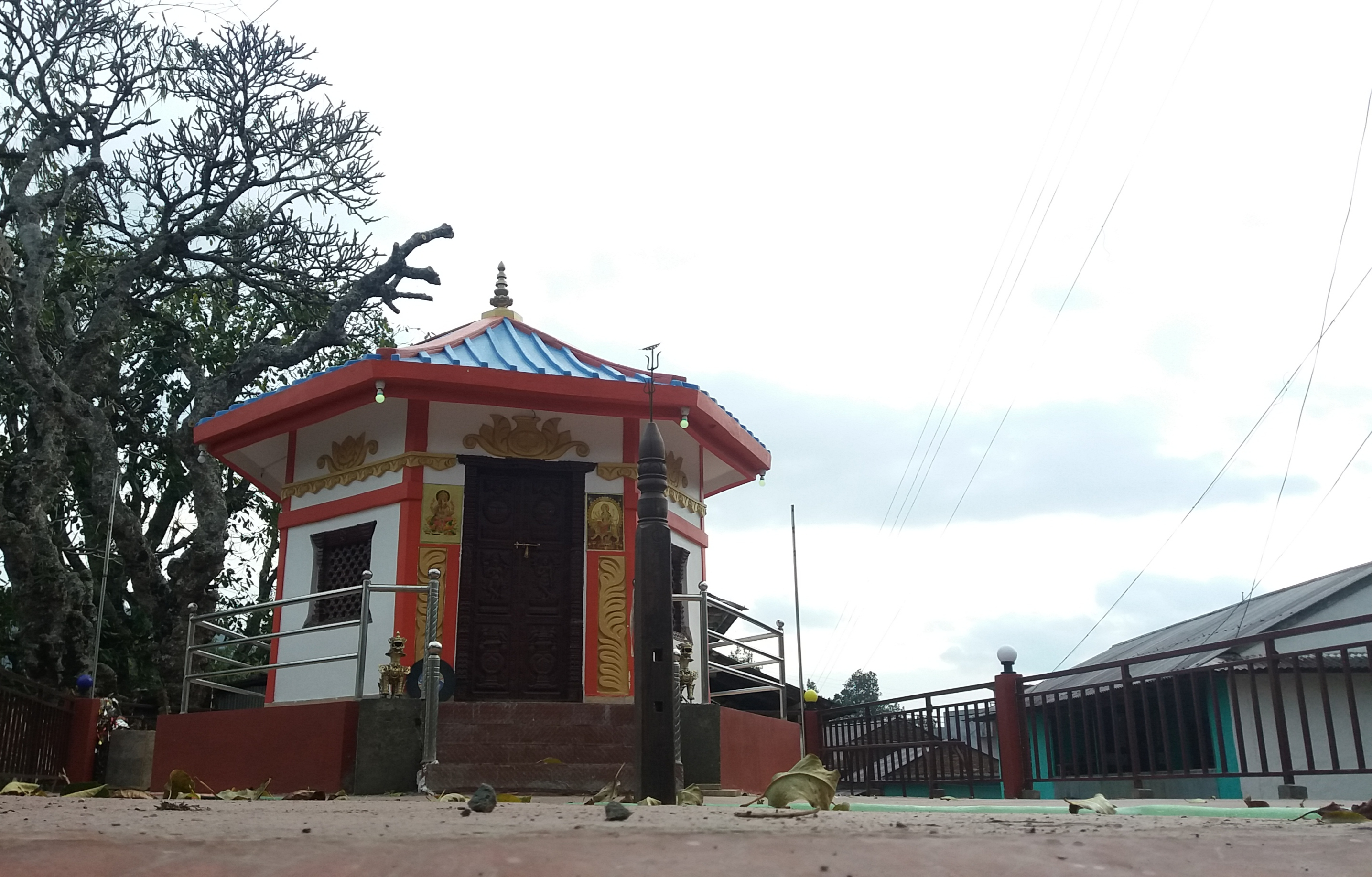 नेपाली: स्याङ्जा जिल्ला, हरिनास गाउपालिका-१ (सालडाँडा गाउँ) नेपालमा रहेको चामुण्डा देवीको मन्दिर